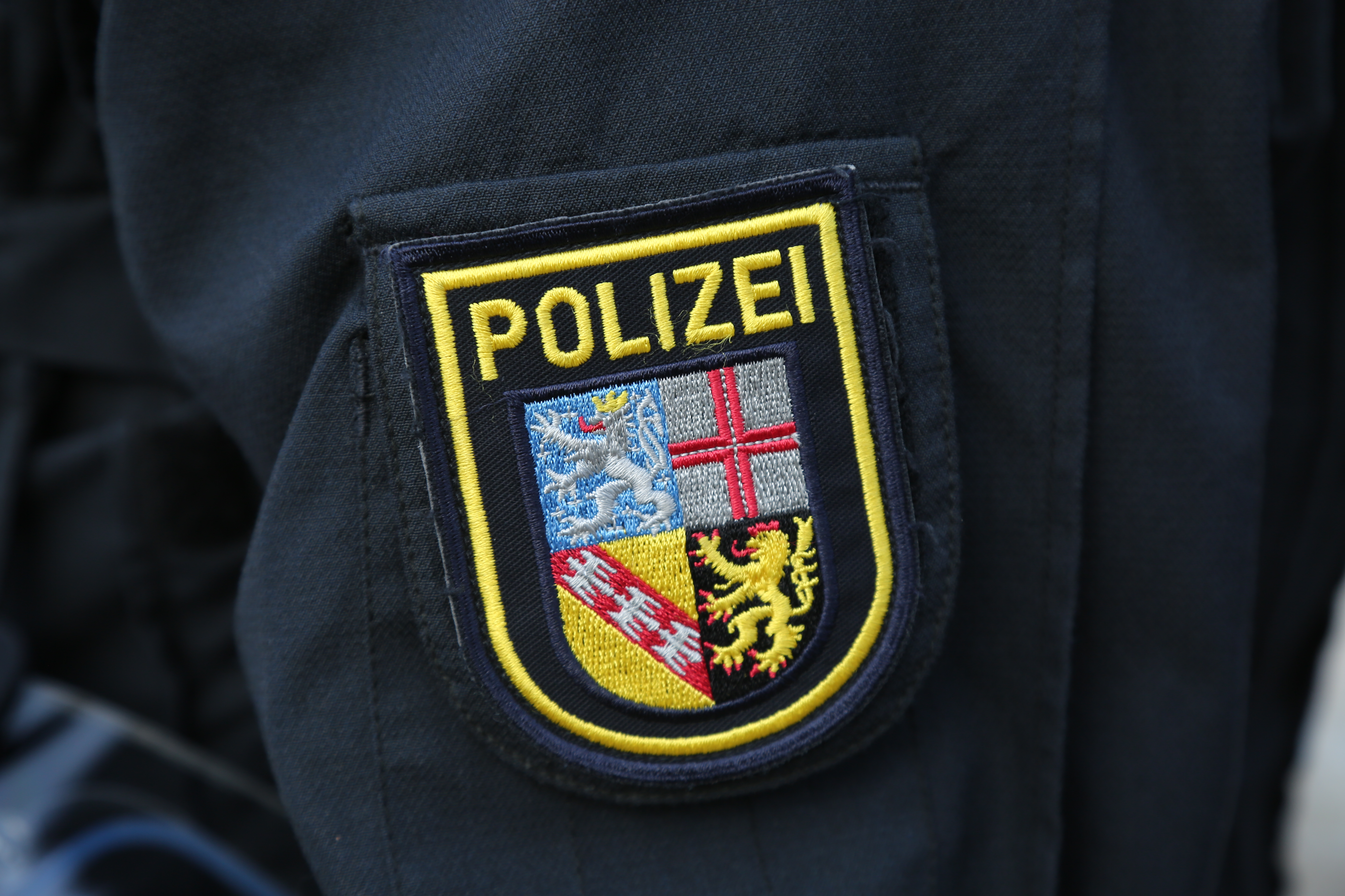 Ärmelwappen der Polizei des Saarlands